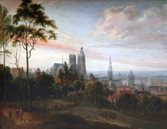 View of Brusselslabel QS:Len,"View of Brussels" label QS:Lpl,"Widok Brukseli"